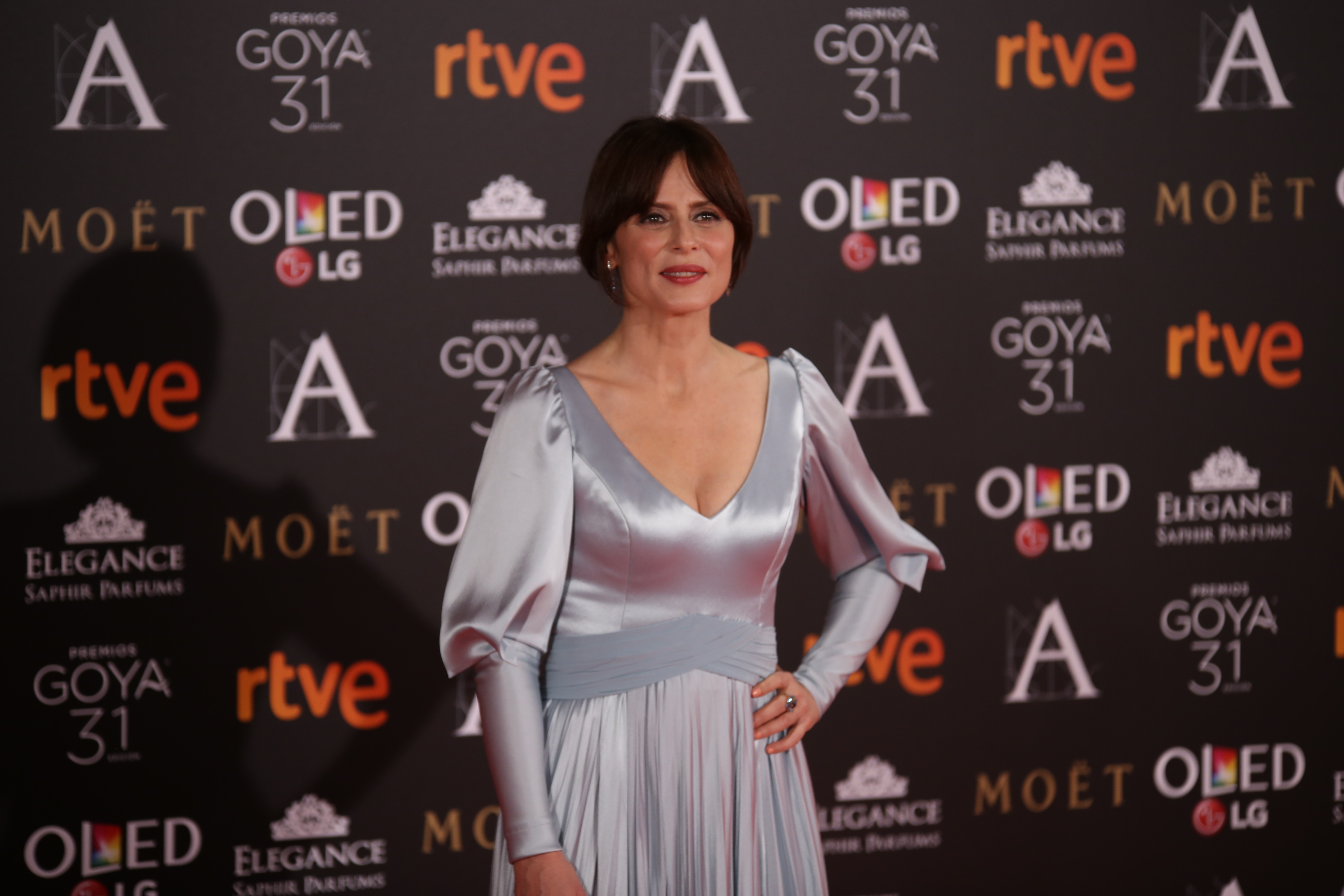 Premios Goya 2017